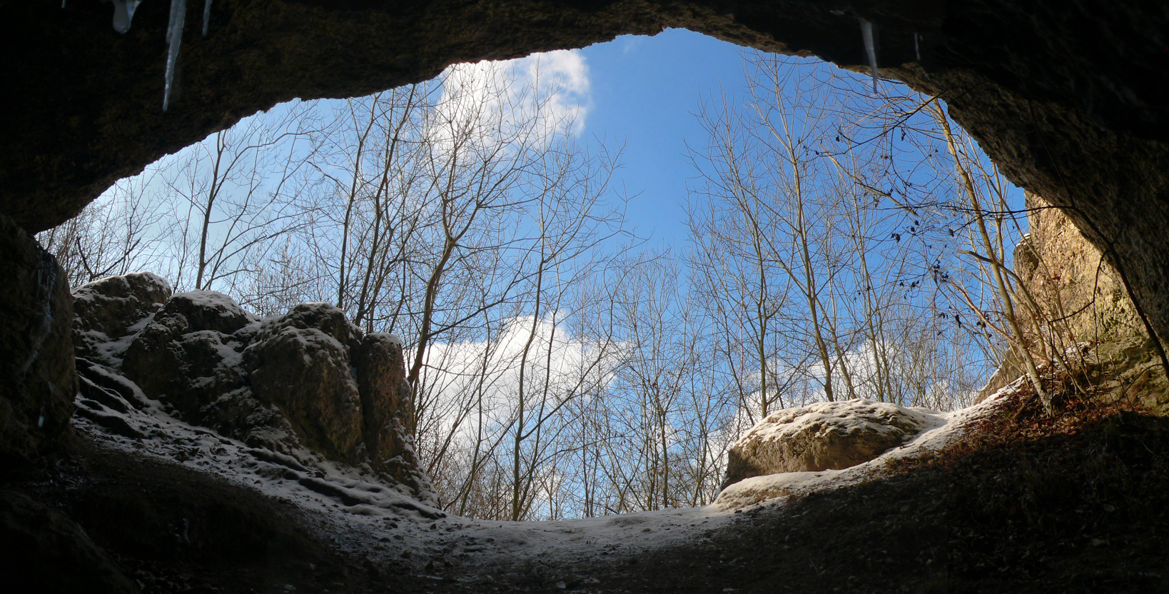 Ausgang der Jettenhöhle